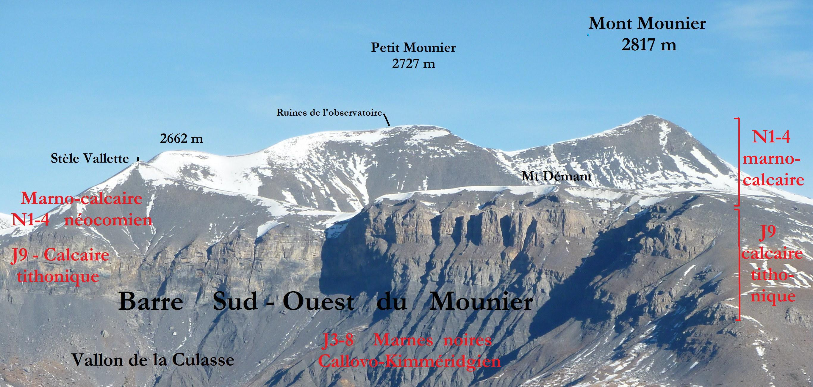 Mont Mounier (2817 m) vu du sud (Alpes Maritimes 06) FRANCE Photographie complétée par André Payan-Passeron.